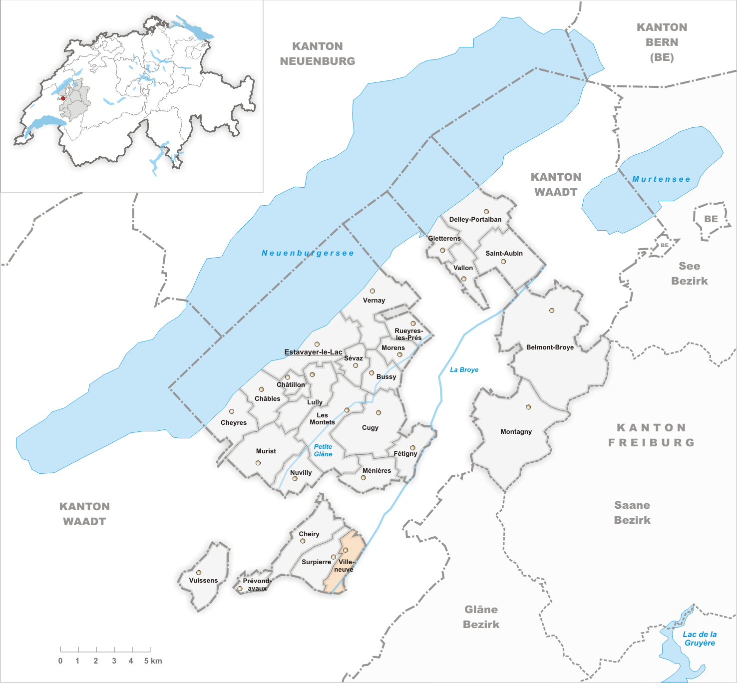 Municipality Villeneuve